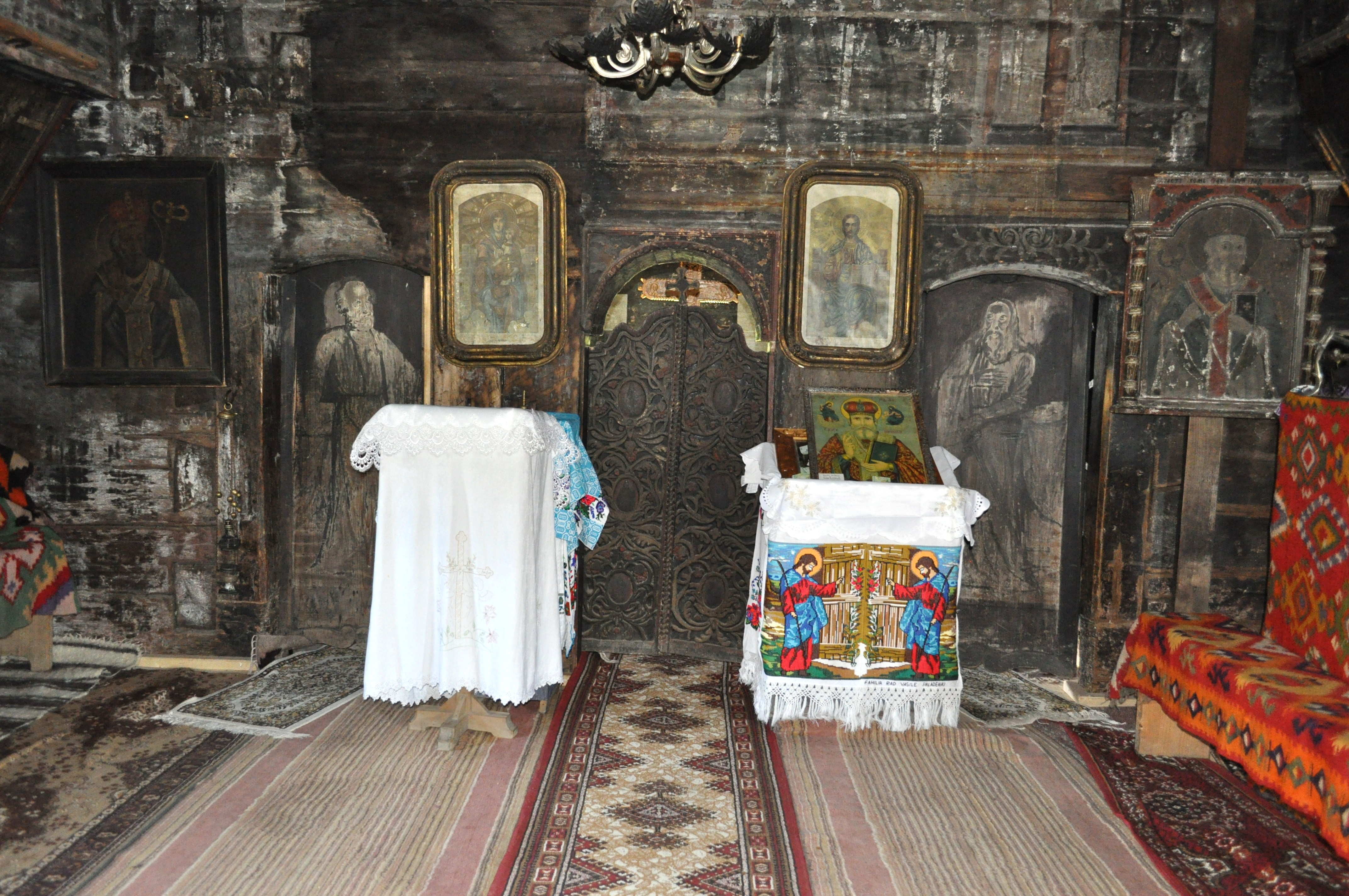 Biserica de lemn "Sfântul Nicolae" (a Nistoreştilor) , oraş SĂLIŞTEA DE SUS